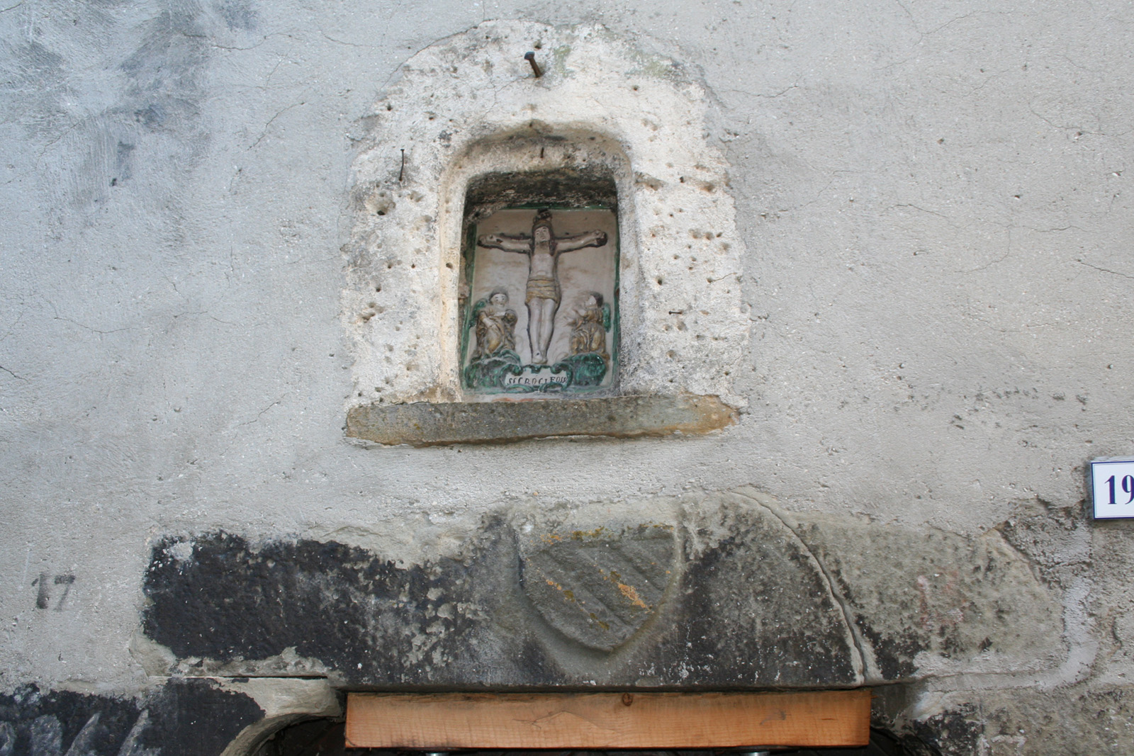 Pietracamela in provincia di Teramo. Edicola votiva del Crocifisso. Interno del paese.